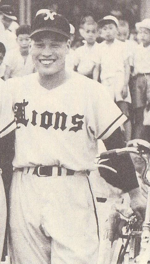 1954年のNPBオールスターゲームにおける、プロ野球選手の中西太。